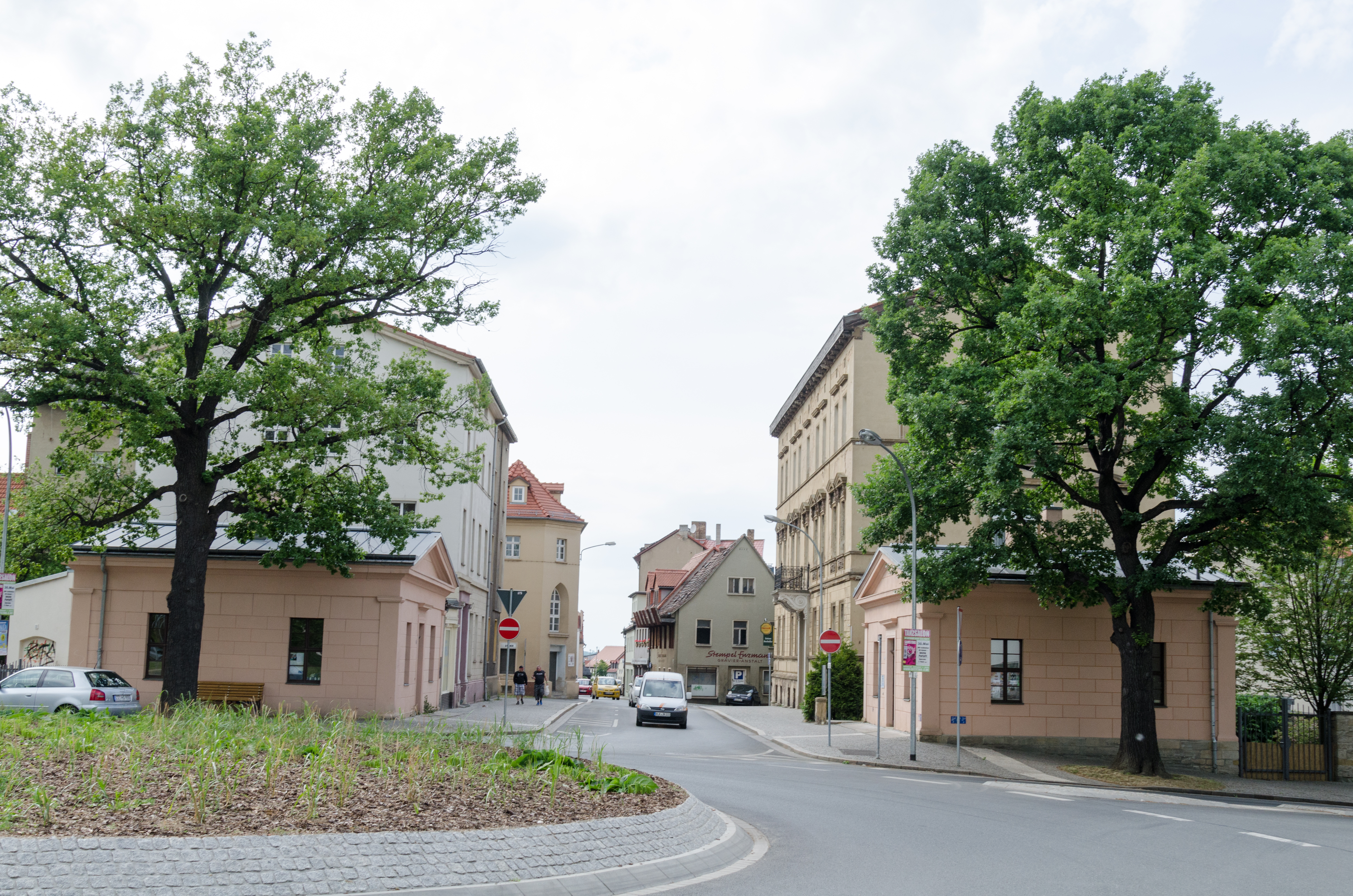 Zeitz, Kalkstraße 21, 22, Torhaus